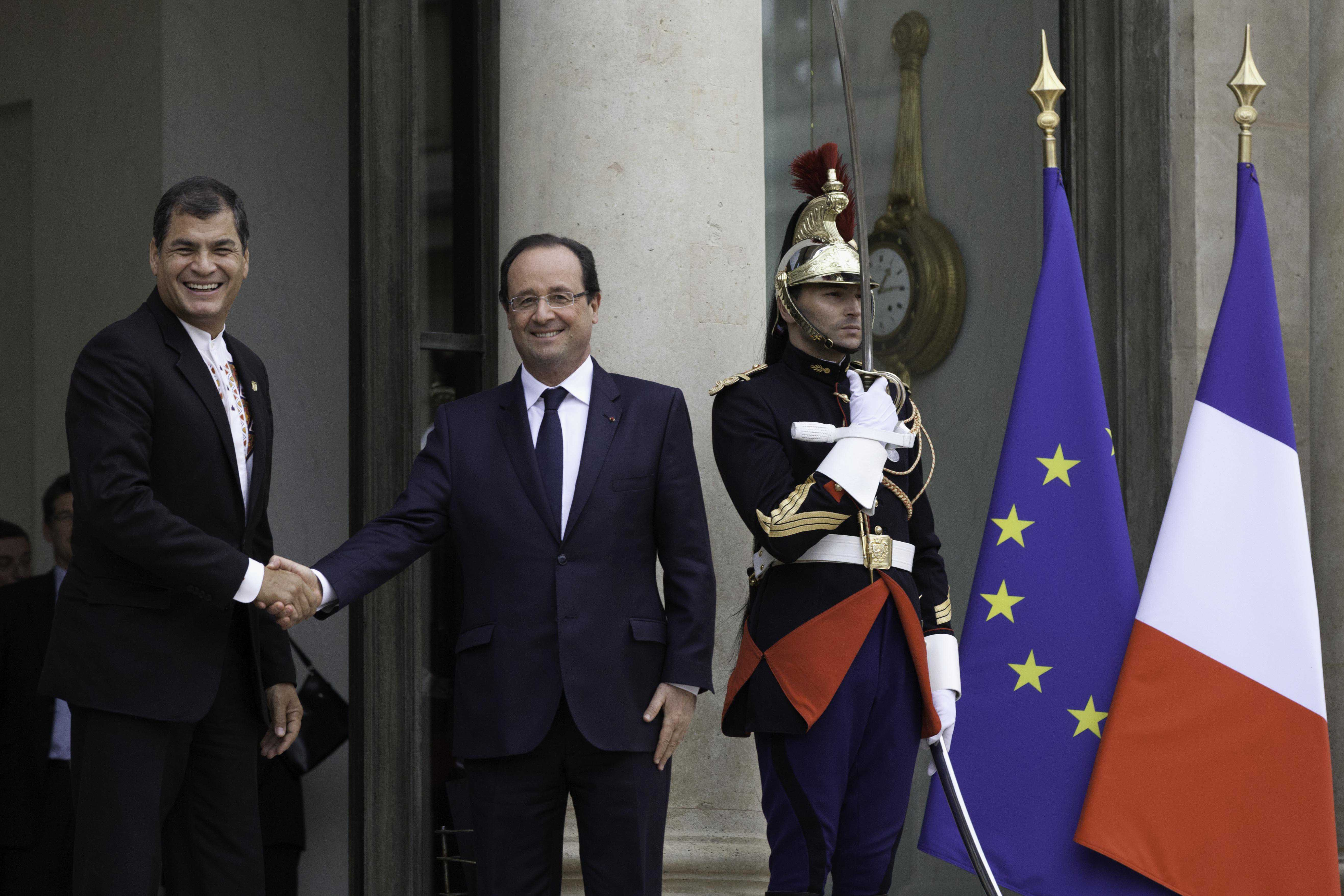 Paris (Francia), 07 de noviembre 2013. El Presidente Rafael Correa fue recibido por su homólogo de Francia, Francois Hollande, en el Palacio del Elíseo. Foto: Fernanda LeMarie - Cancillería del Ecuador.